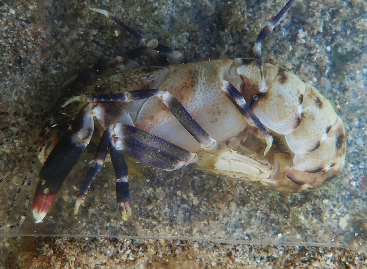 Axiopsis pica à la Réunion.